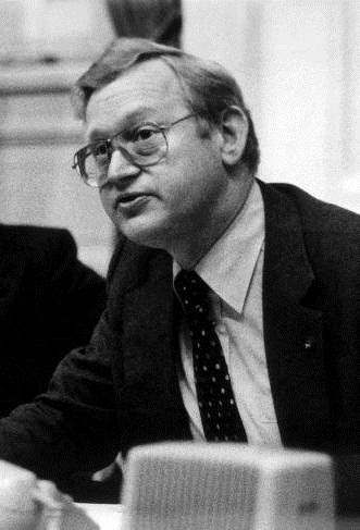 Minister Frans Andriessen (KVP/CDA) van Financiën naast van Agt (KVP/CDA)